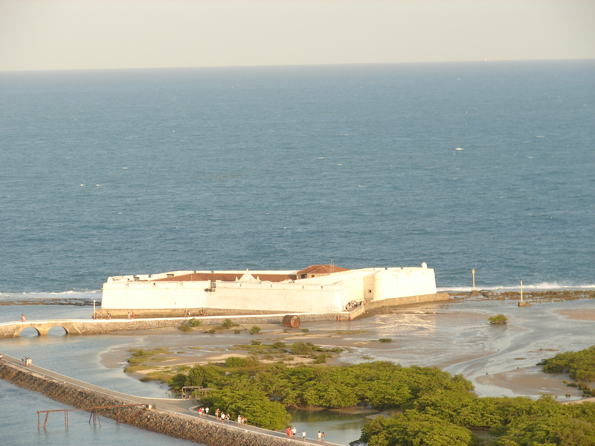 Vista do Forte dos Reis Magos - Natal/Brasil.